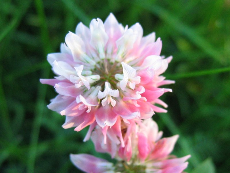 Schweden-Klee (Trifolium hybridum)